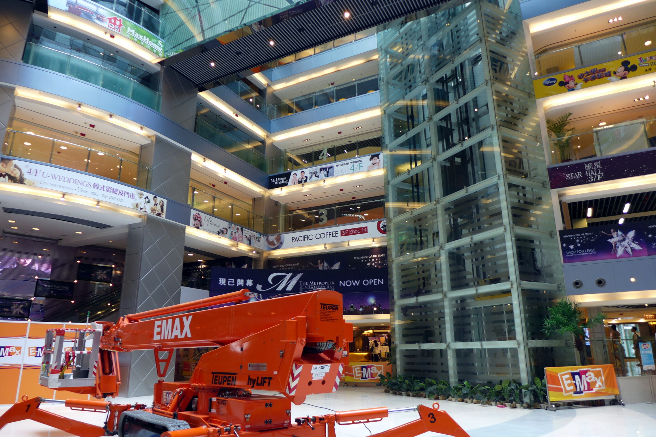 EMax Main Atrium